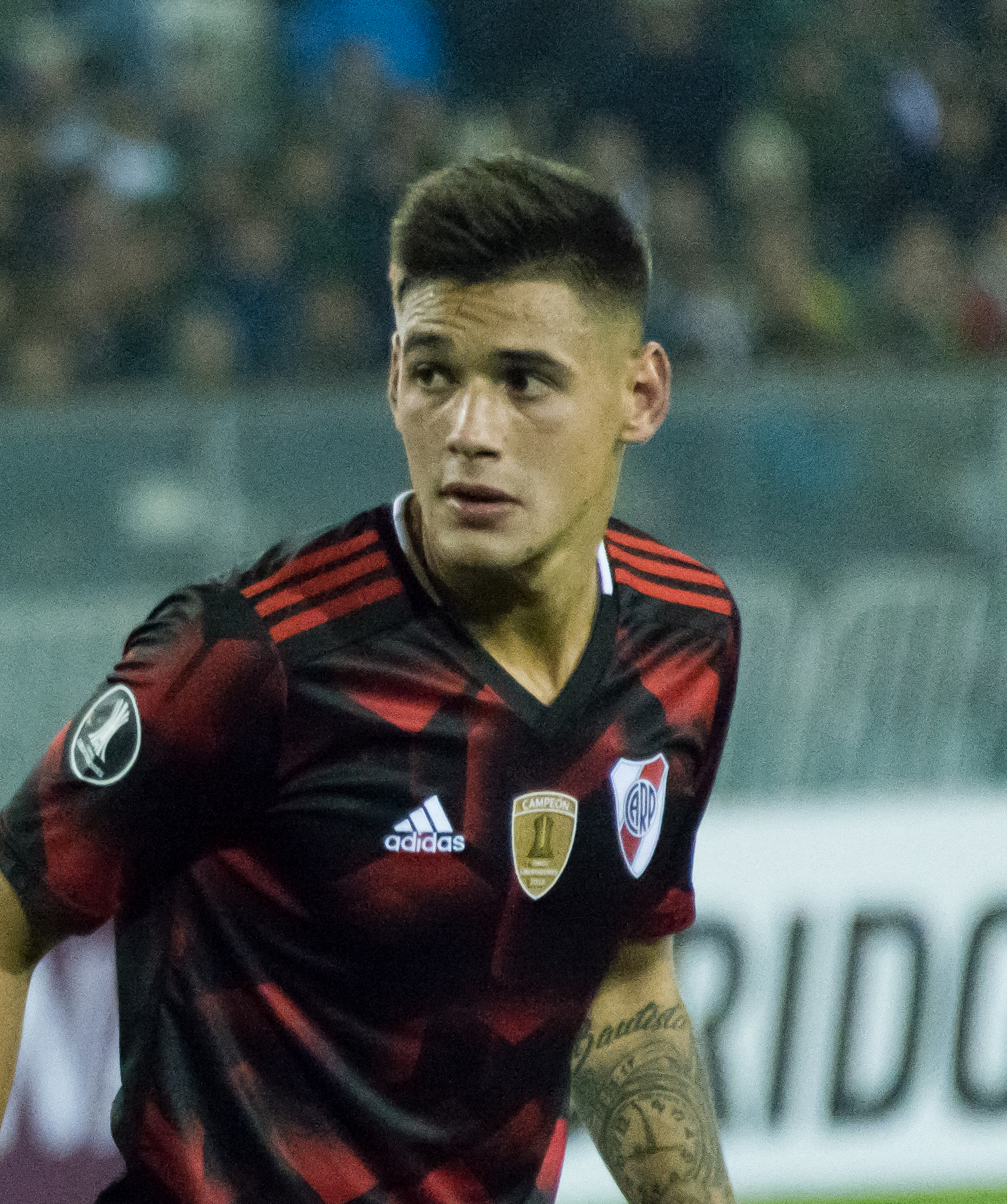 Palestino v River Plate, Estadio Monumental, Macul, Santiago, Región Metropolitana, Chile.